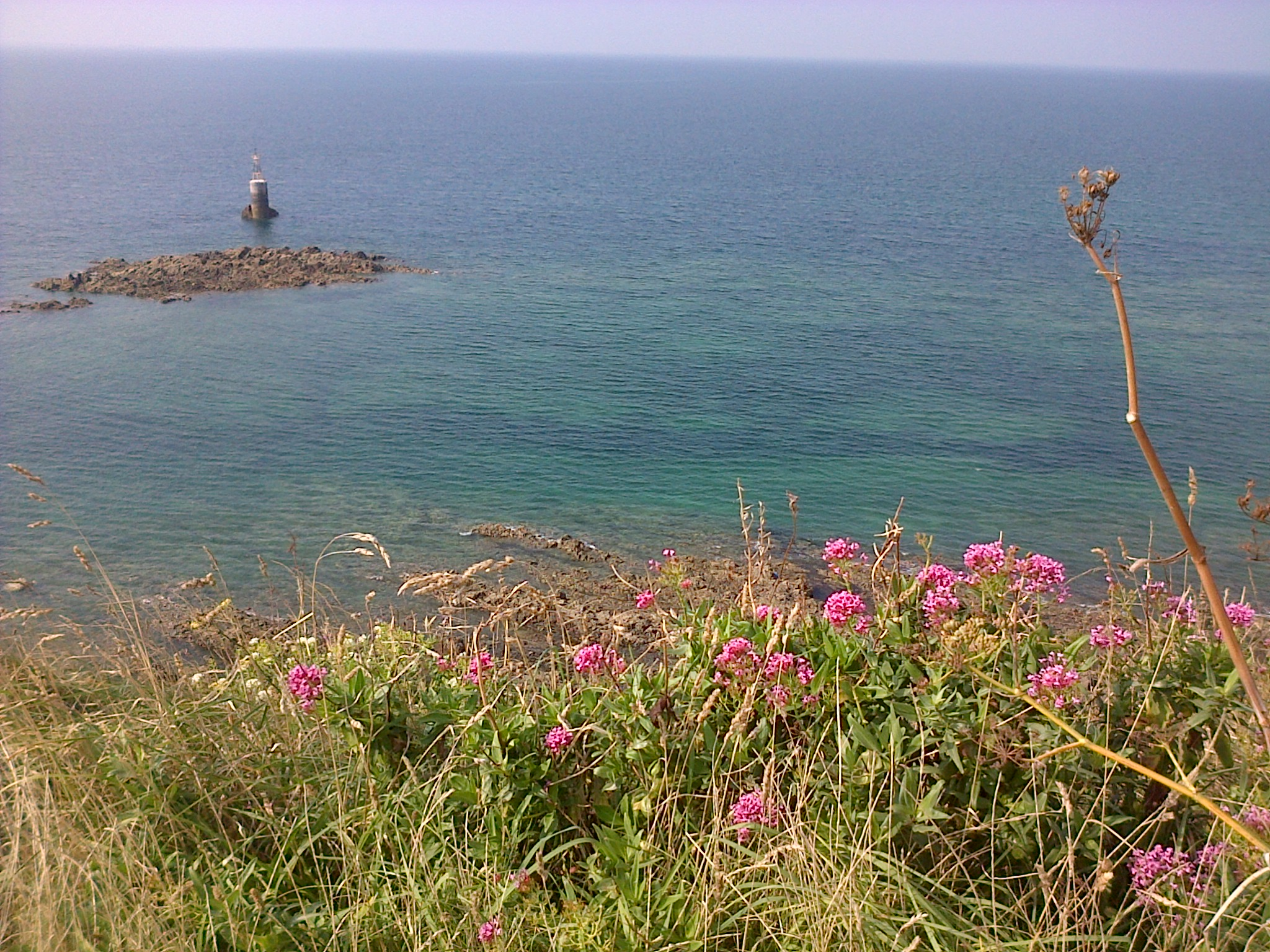 La Manche vue depuis le sentier du littoral de Granville.